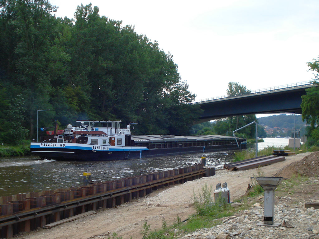 Limbach, Stadt Eltmann, Bayern